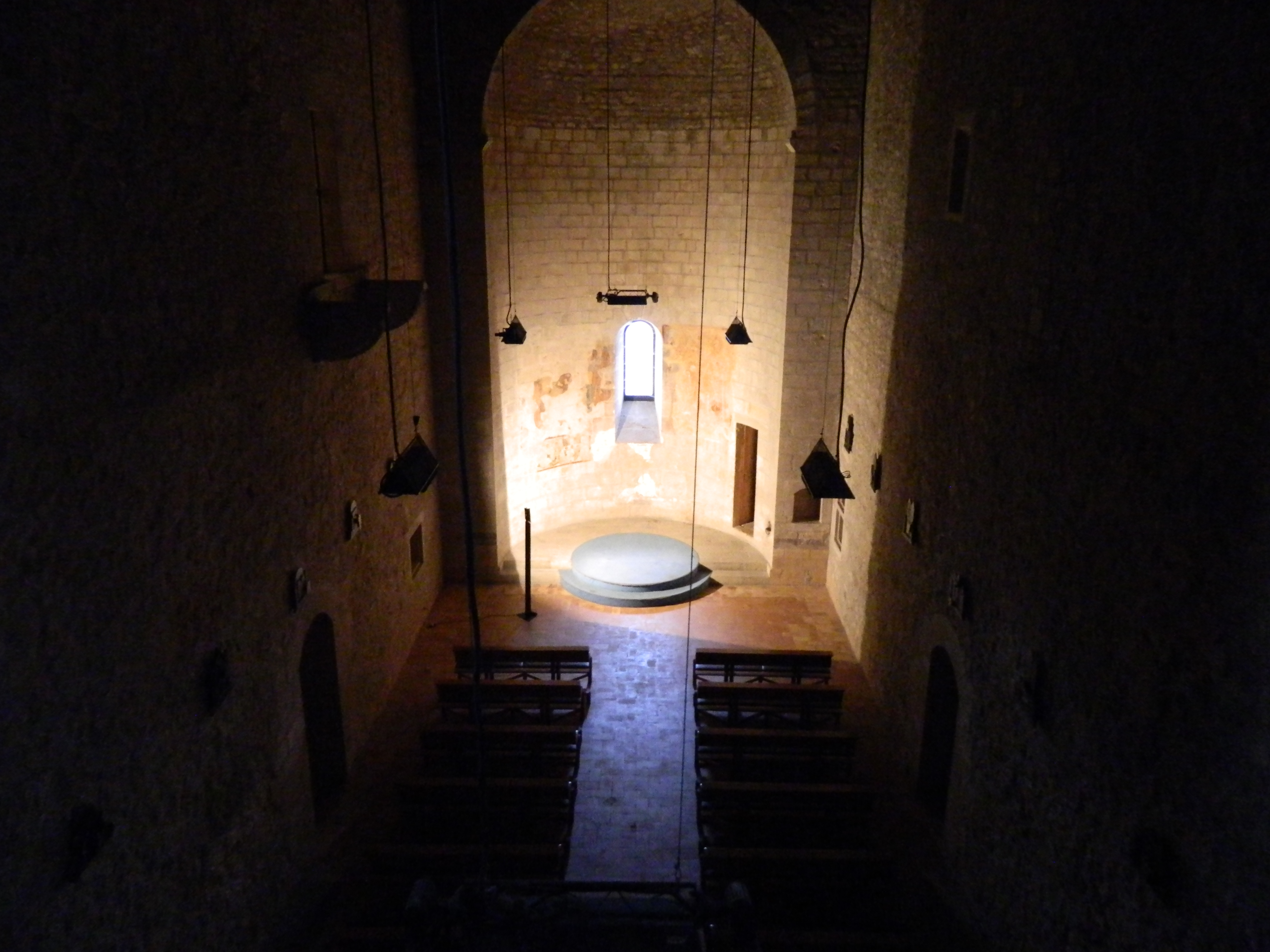 Castello di Lagopesole (Avigliano, PZ) - La cappella vista dai corridoi superiori del castello.